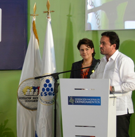 Paúl Carrasco, en la Cumbre de Gobernadores, Colombia, 2013.